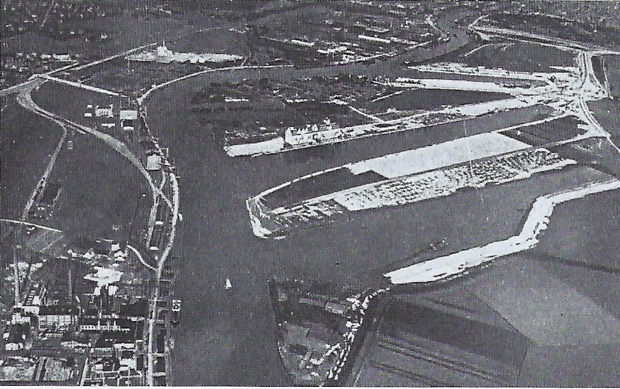 Neue Hafenbecken am Unterlauf des Pregels in Königsberg